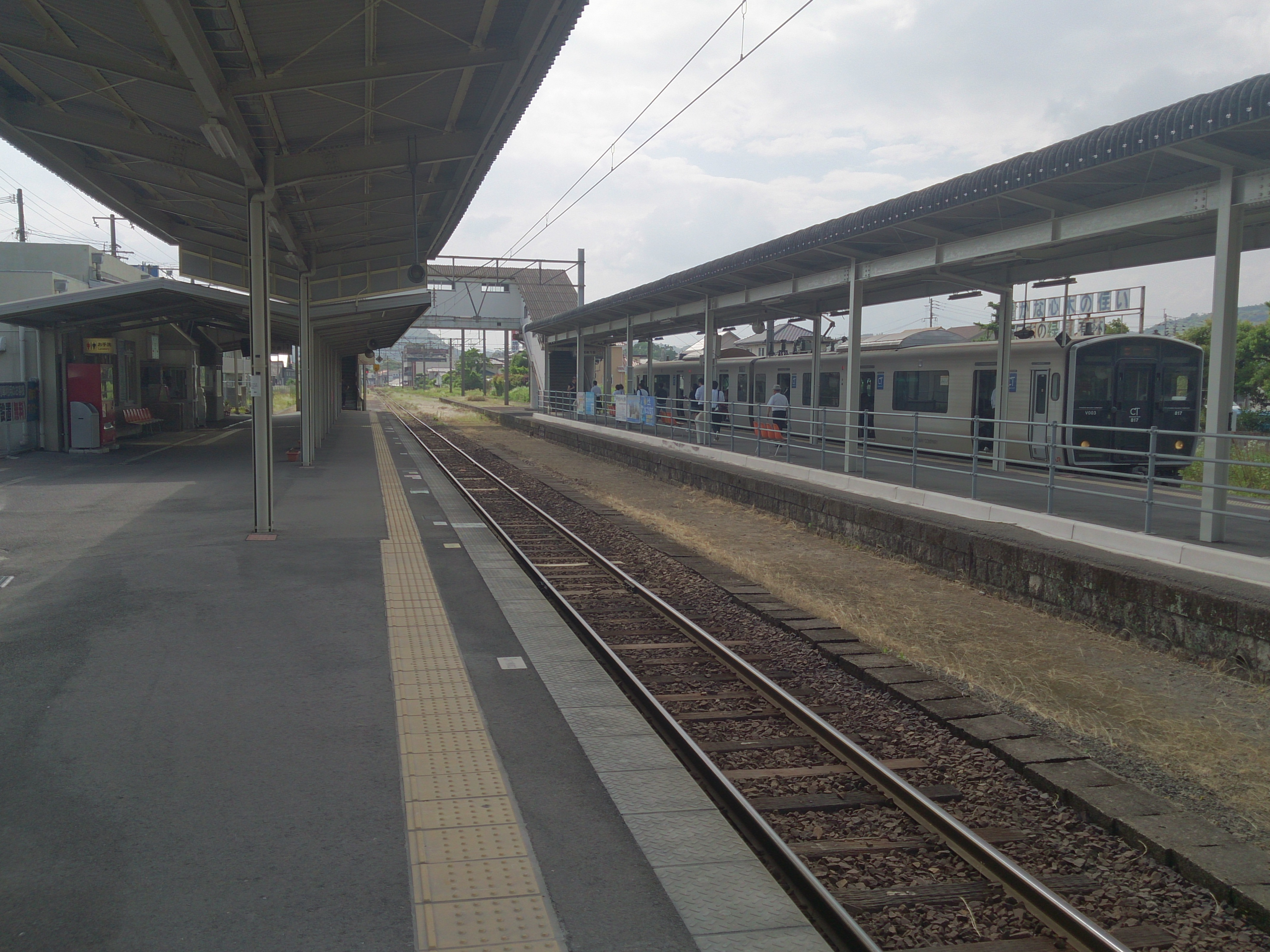 加治木駅 ホーム